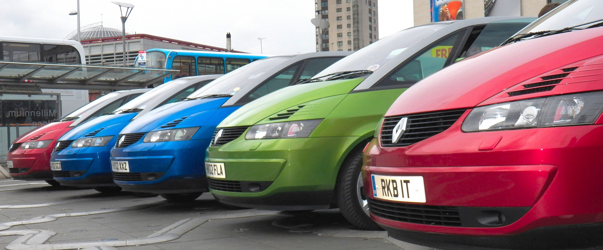 Renault Avantimes